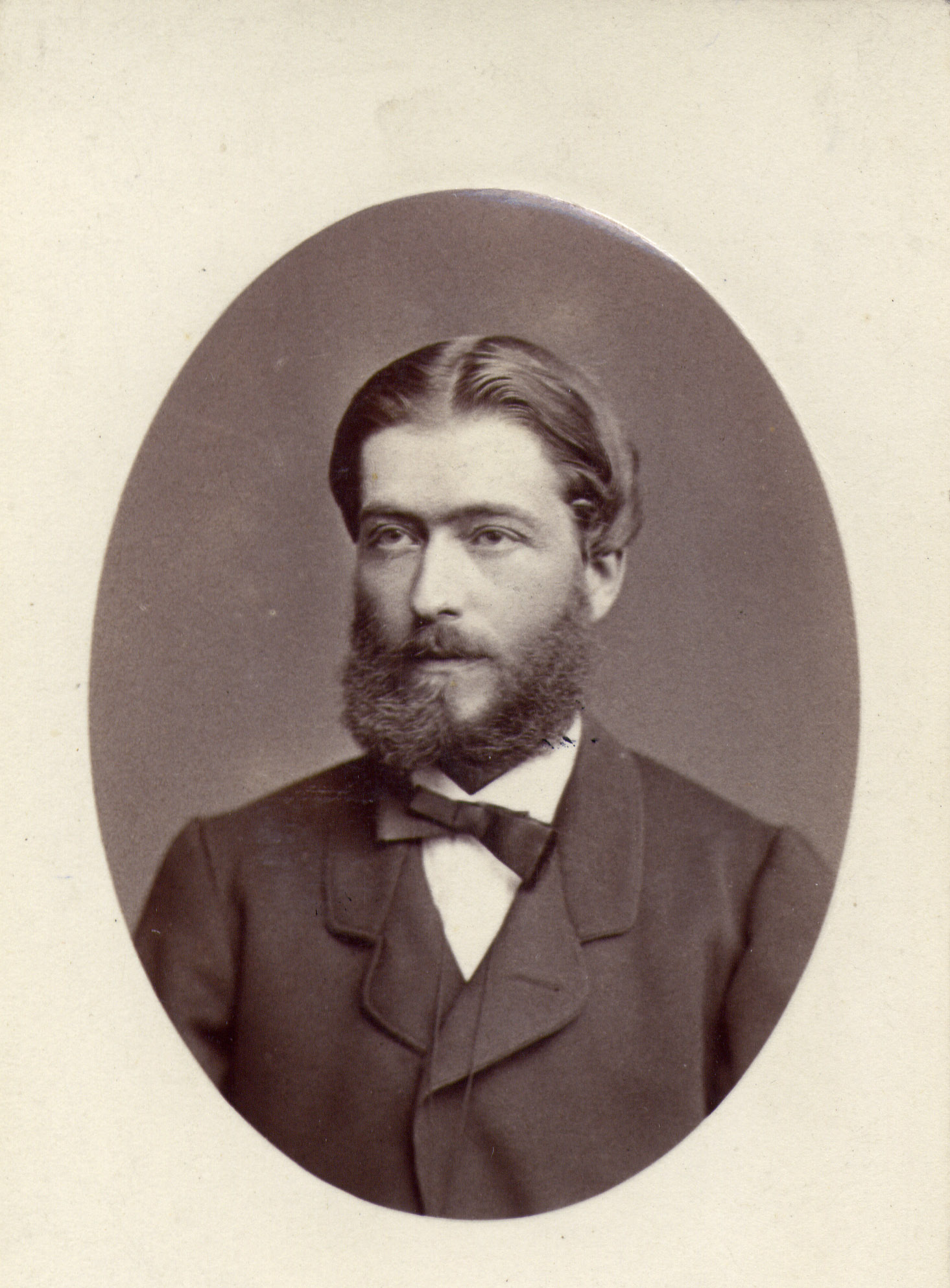 Portrait de Xavier Nessel